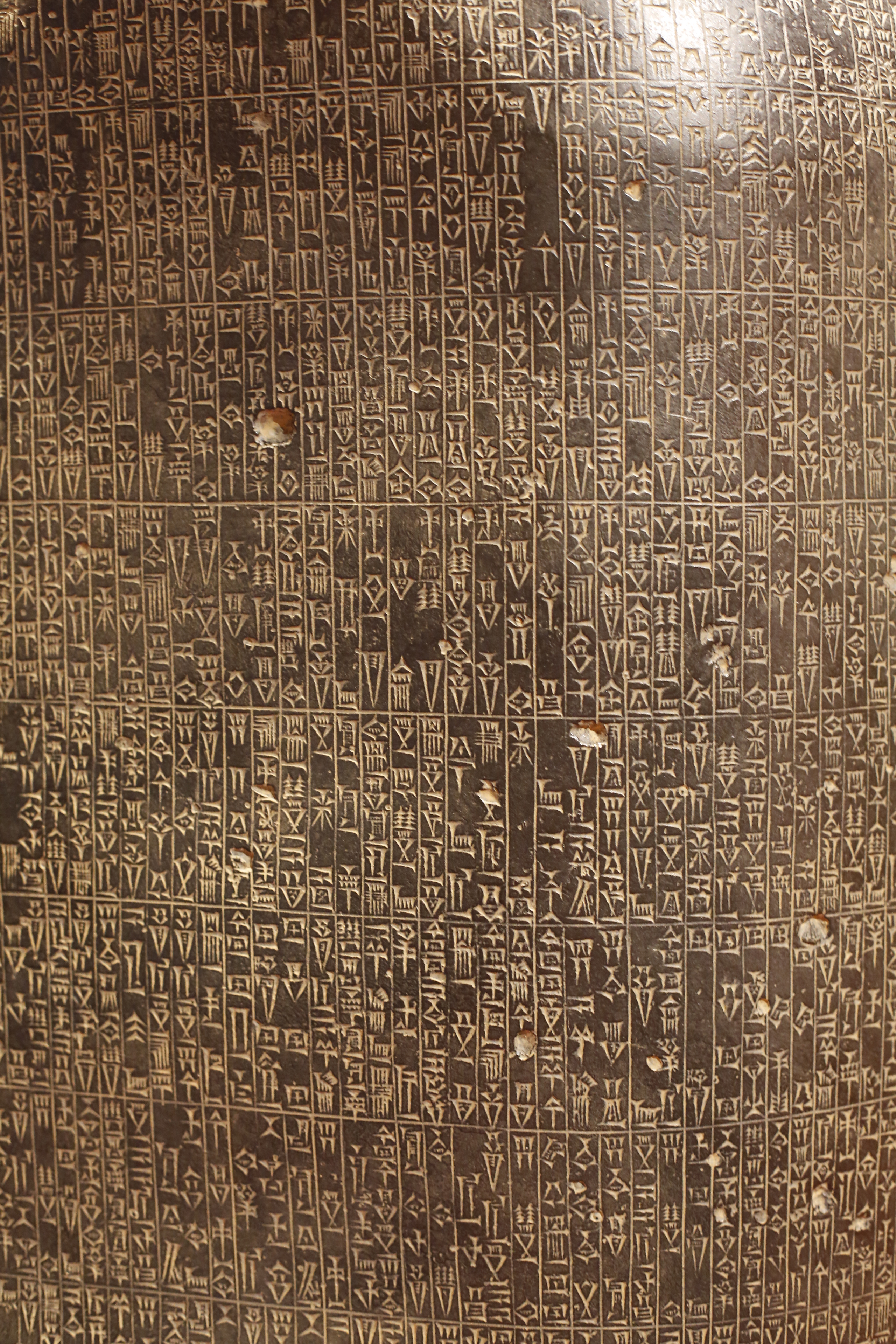 Détail du code de Hammurabi au musée Champollion (Figeac).